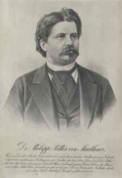 Mauthner, Philipp von, rakouský právník českého původu